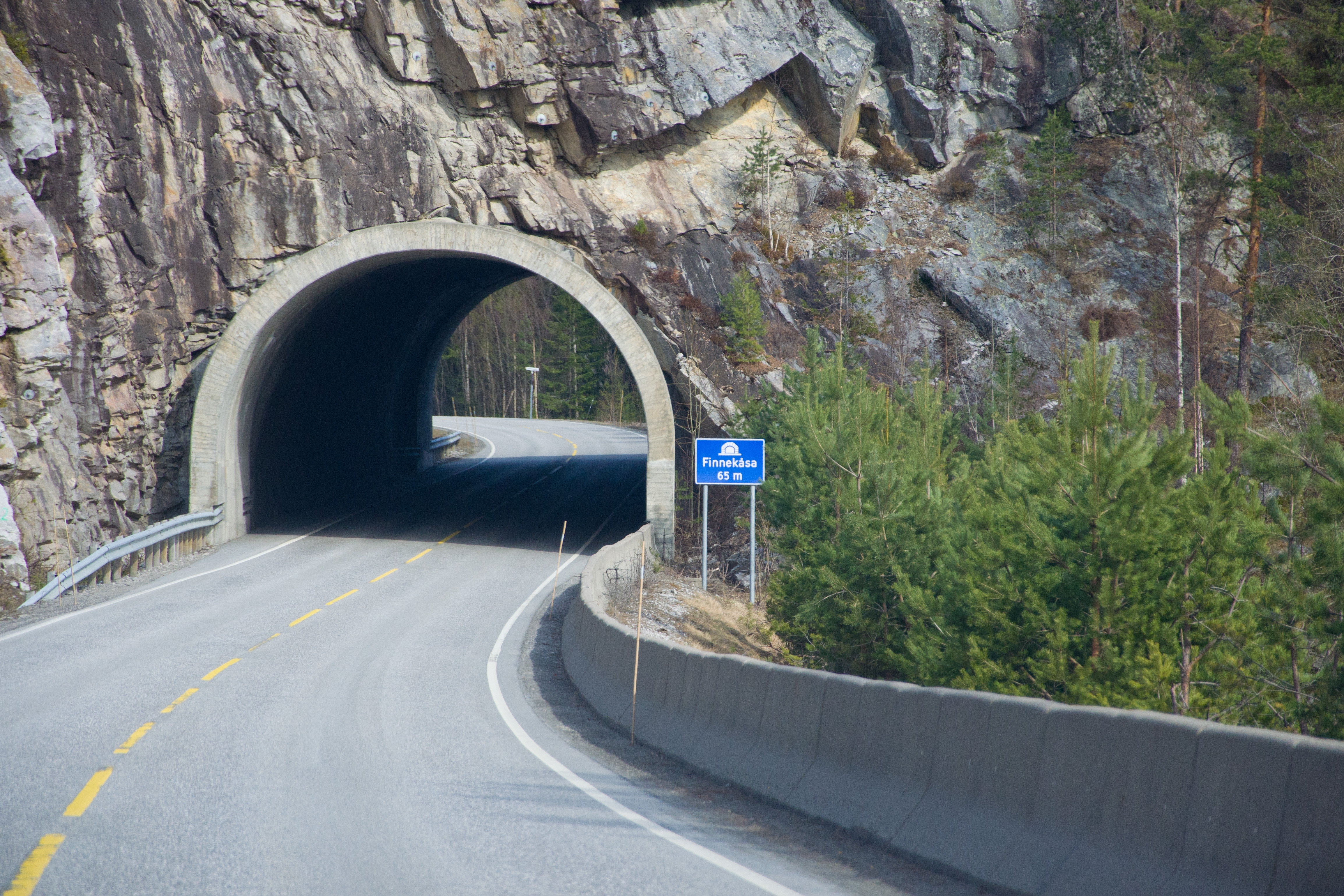 Finnekåsatunnelen på fylkesvei 37 i Notodden